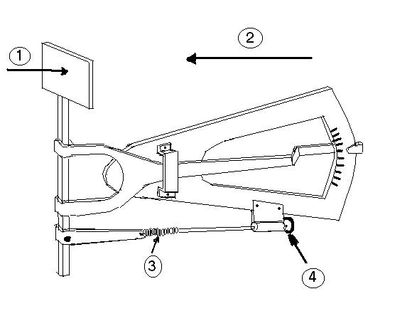 Anemometer_Etévé_drawing Drawing jean-patrick Donzey